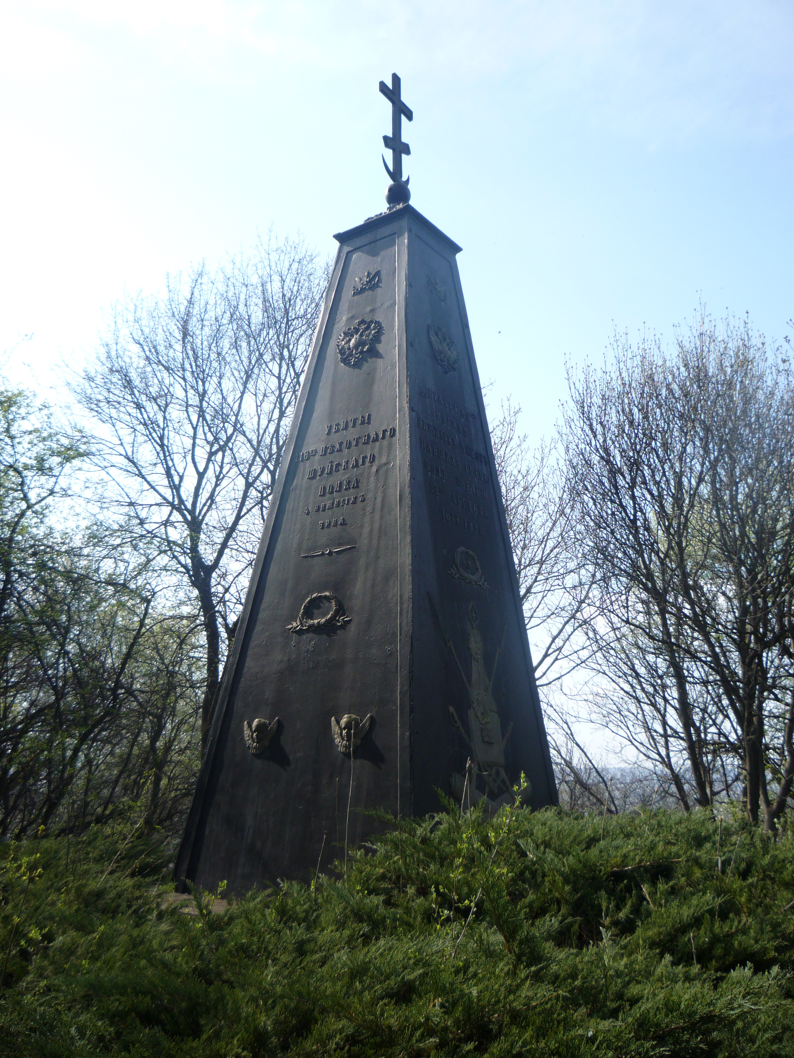 Черния надгробен паметник в Ловеч. Издигнат за 4 войника от 118-ти пехотен Шуйски полк и 11 войника от 64-ти пехотен Казански полк, загинали на 20-23 август 1877г. при освобождението на Ловеч от османско иго.